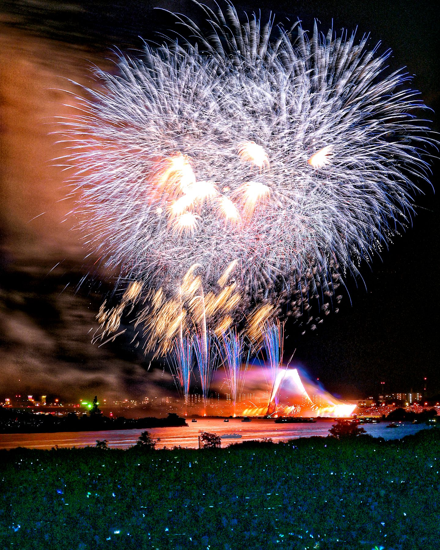 2019年8月3日開催の江戸川区花火大会2019（市川市民納涼花火大会と共催）を江戸川区側から撮影。毎年恒例の富士山仕掛け花火の模様。